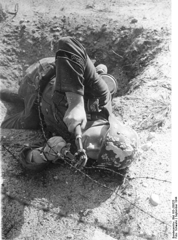 Regimentsführer [der Panzertruppen] besichtigen Ausbildungslehrgänge eines Ersatztruppenteiles UBz: Unbemerkt vom Gegner muss das Drahthinderniss beseitigt werden. Fot. Schwahn 9.9.44 [Herausgabedatum] Vortext siehe J30517